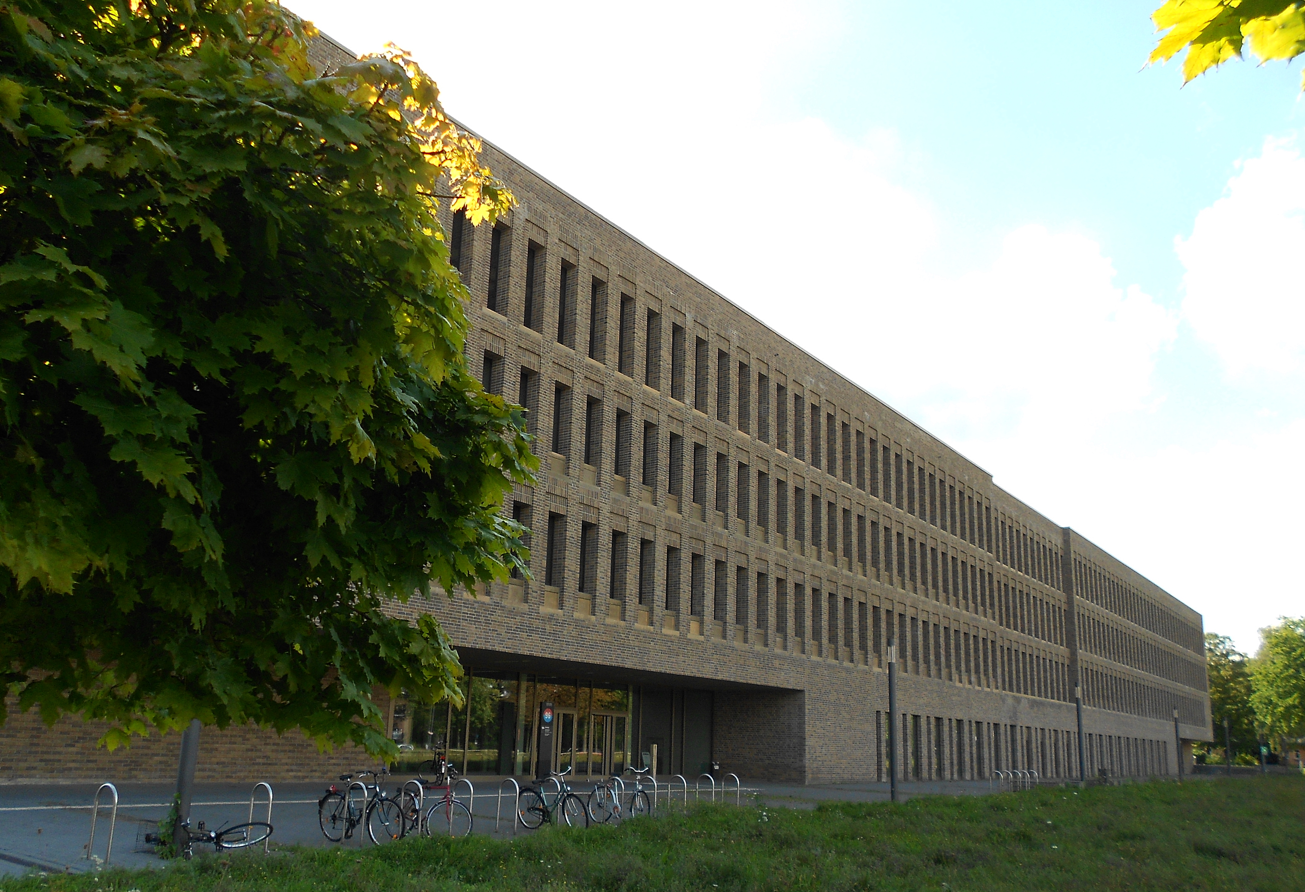 Gebäude der Universitätsbibliothek Osnabrück, Bereichsbibliothek N sowie der Zentralbibliothek der Hochschule Osnabrück auf dem Campus Westerberg